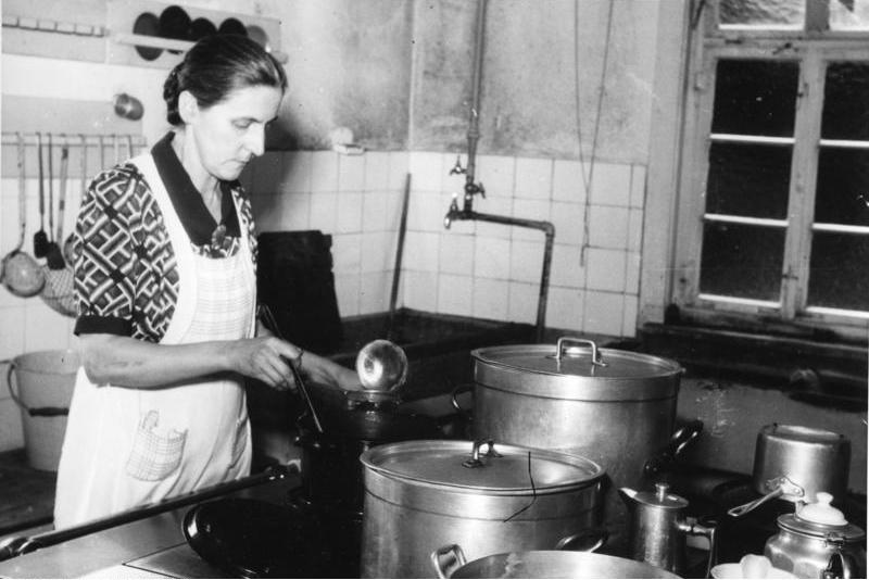 Kinder- Jugendheim Alpirsbach/Schwarzwald